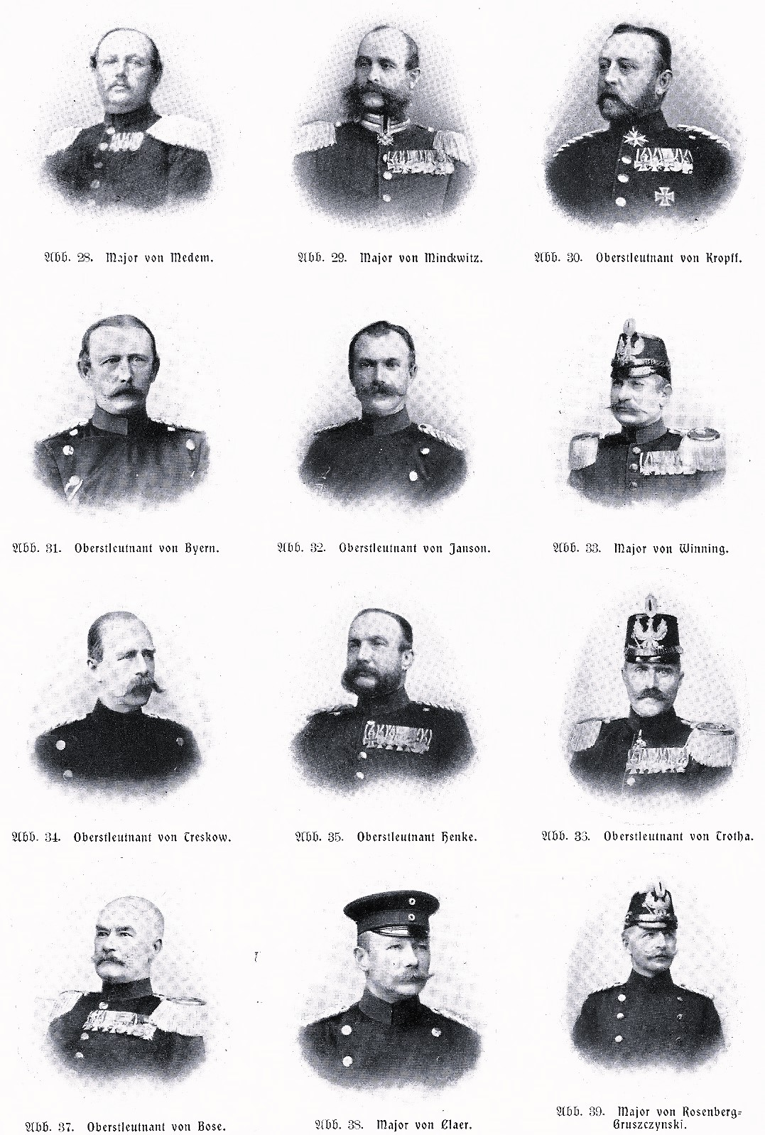 Bataillonskommandeure von der ersten 25 Jahre des Lauenburgischen Jäger-Bataillons Nr. 9